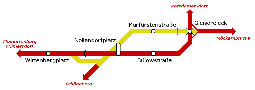 Scheme of the Berlin U-Bahn bypass ("Entlastungsstrecke") from Gleisdreieck to Nollendorfplatz